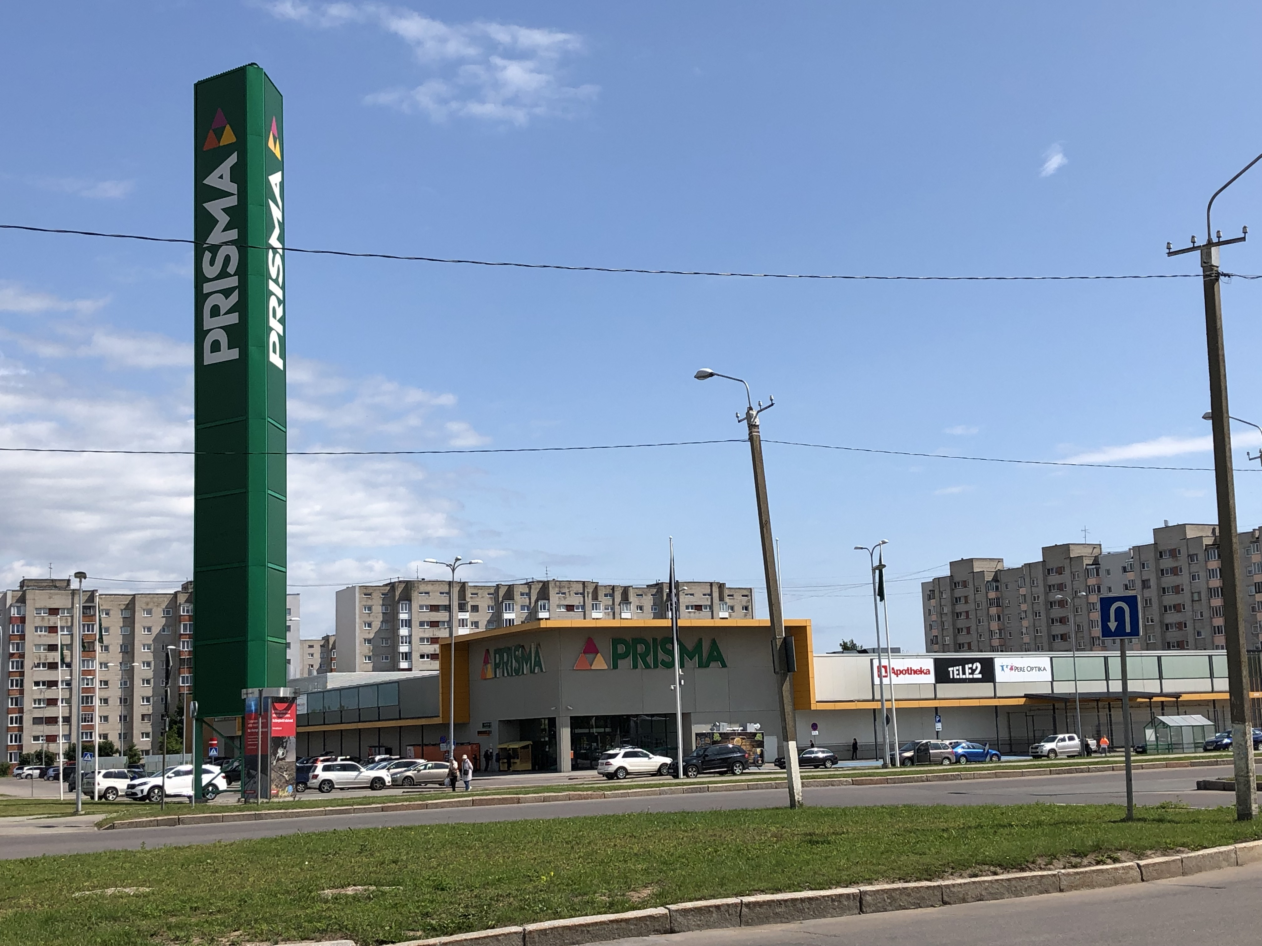 Narva Prisma kauplus